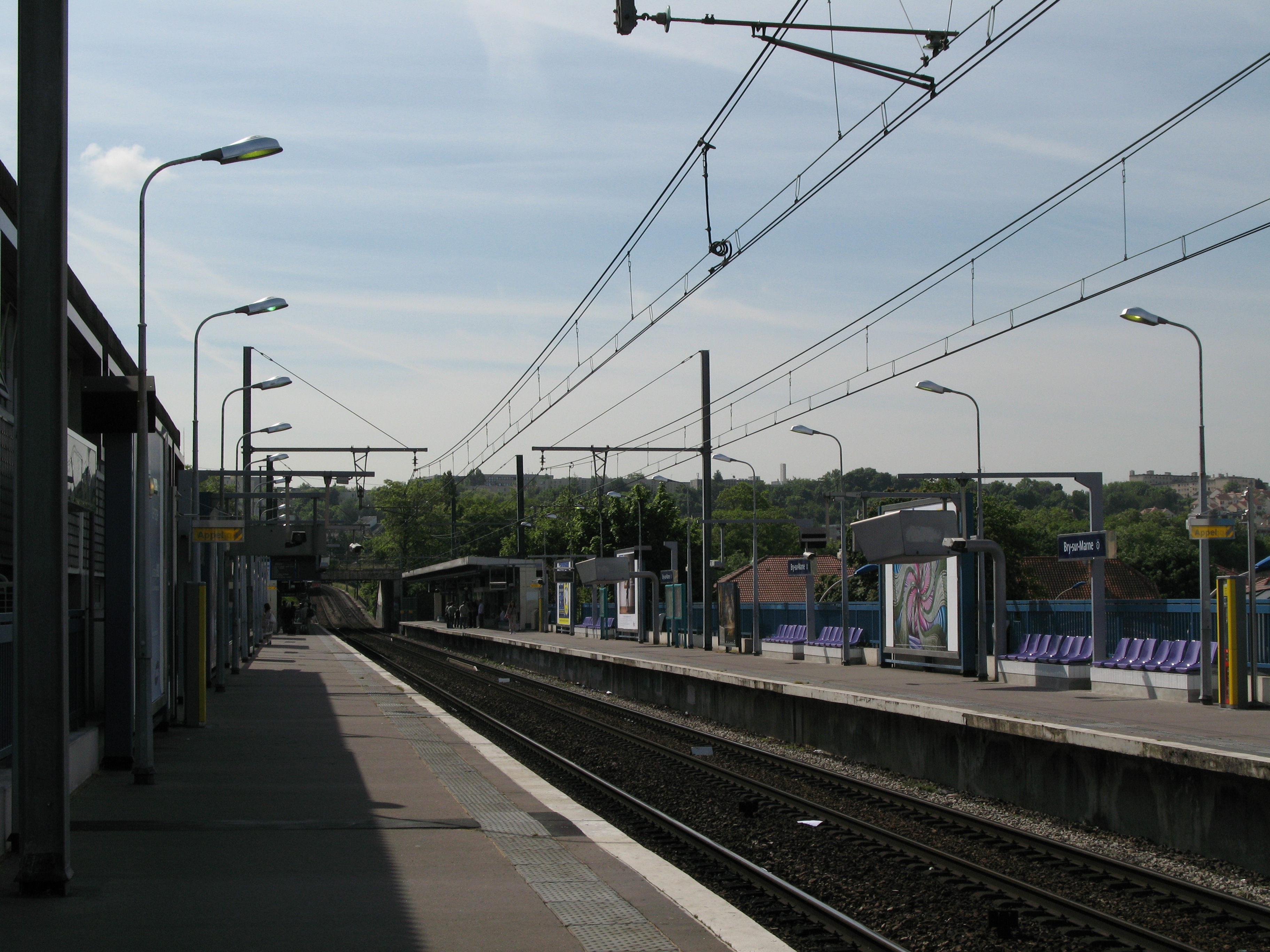 Quais de la gare de Bry-sur-Marne RER_France